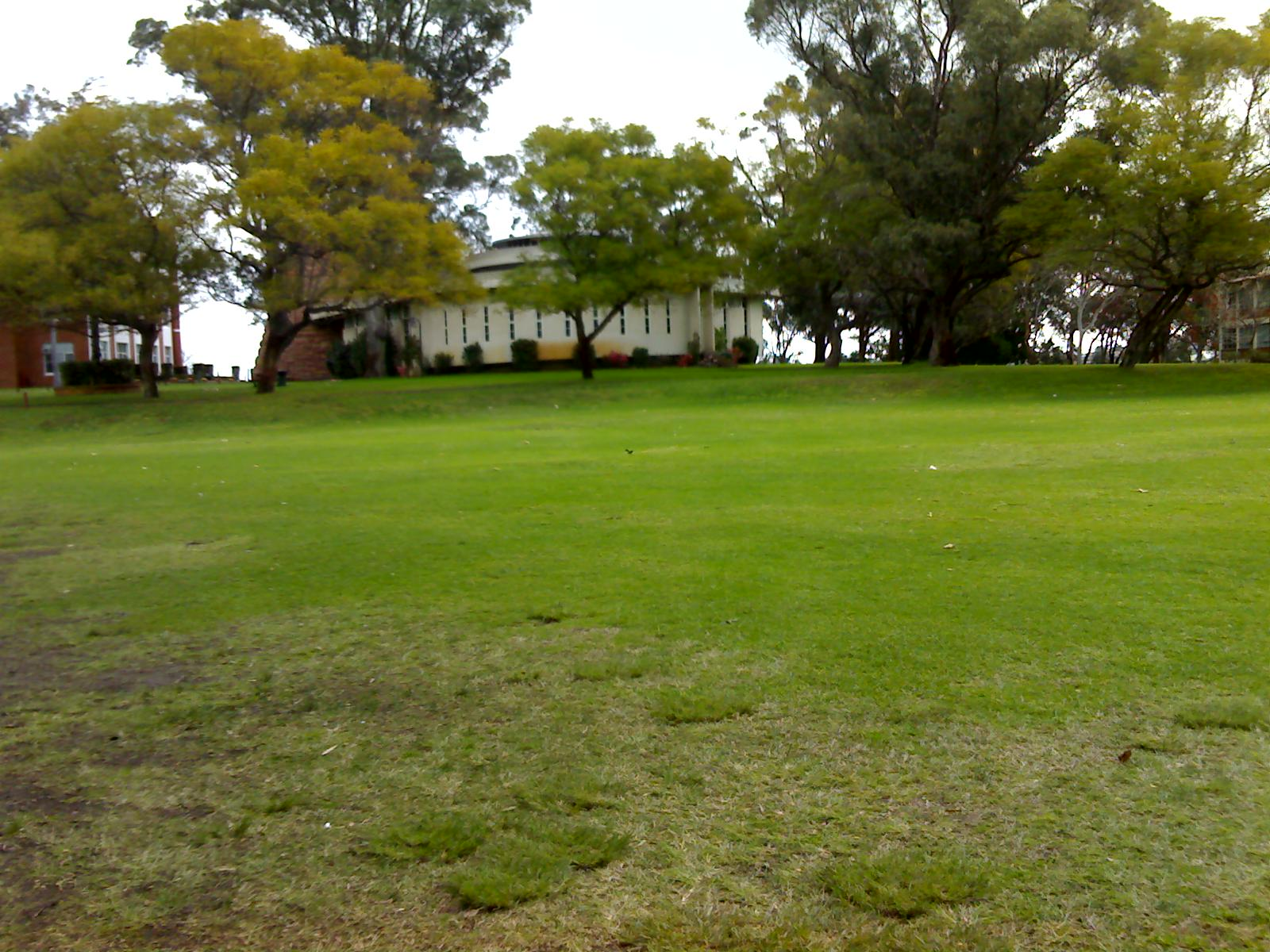 Chapel at Aquinas College, Perth